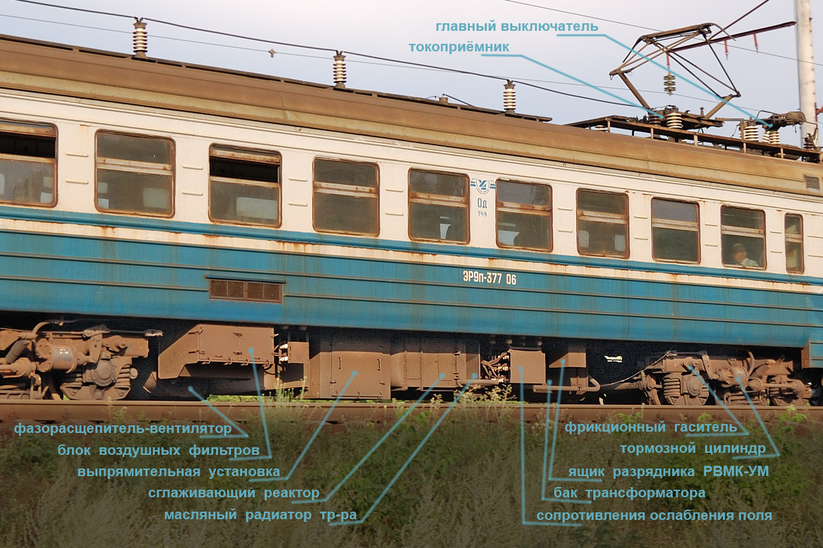 Подвагонное оборудование моторного вагона ЭР9П, ЭР9М. Отличие ЭР9М — выпрямительная установка меньшего размера.